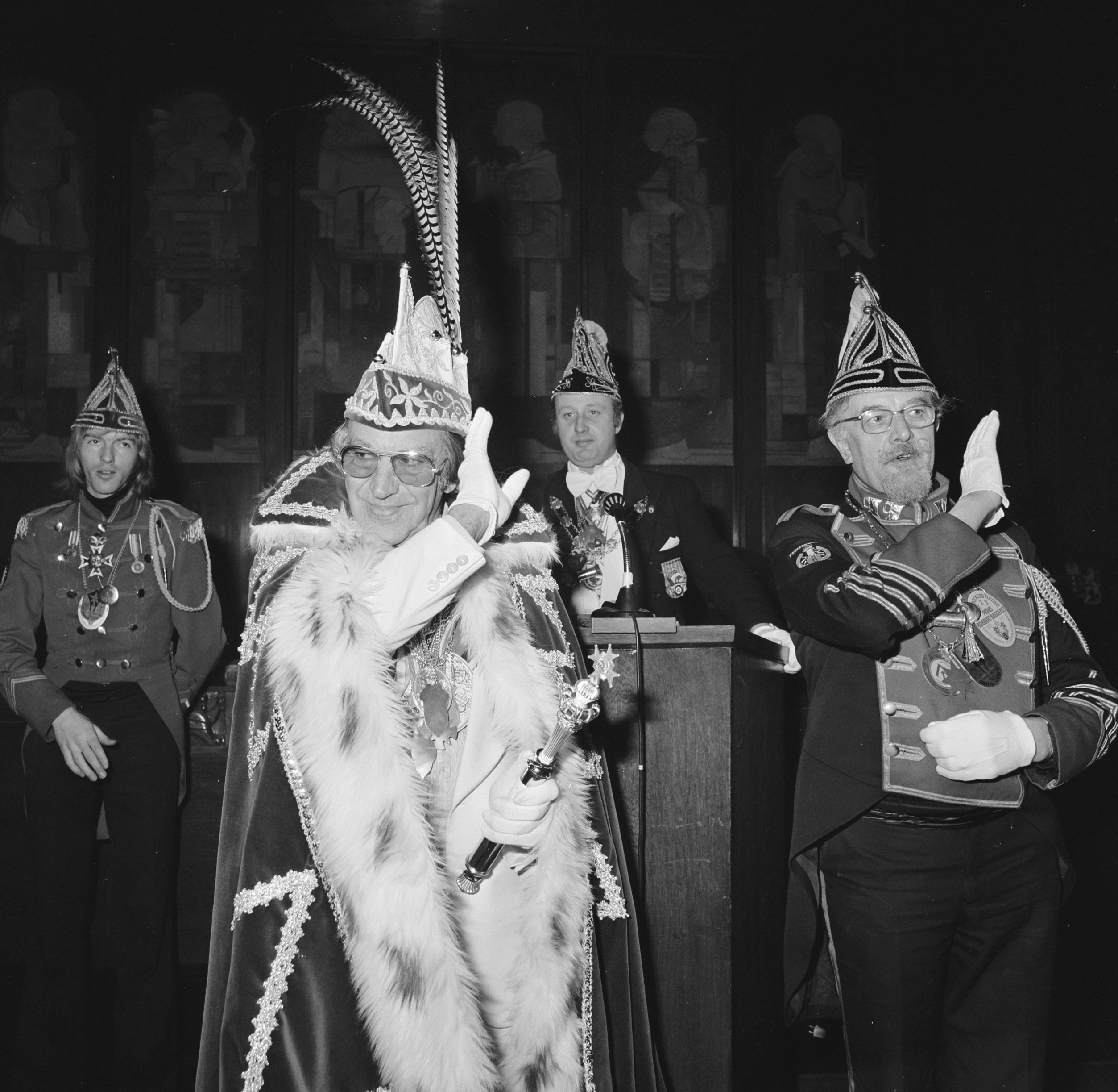 Collectie / Archief : Fotocollectie Anefo Reportage / Serie : [ onbekend ] Beschrijving : Grootvorst Hendrik Ferdinand v.d. Kroon (Lou van Rees) brengt de carnavalsgroet Datum : 15 februari 1977 Locatie : Amsterdam, Noord-Holland Trefwoorden : carnaval Persoonsnaam : Rees, Lou van Fotograaf : Croes, Rob C. / Anefo Auteursrechthebbende : Nationaal Archief Materiaalsoort : Negatief (zwart/wit) Nummer archiefinventaris : bekijk toegang 2.24.01.03 Bestanddeelnummer : 929-0300